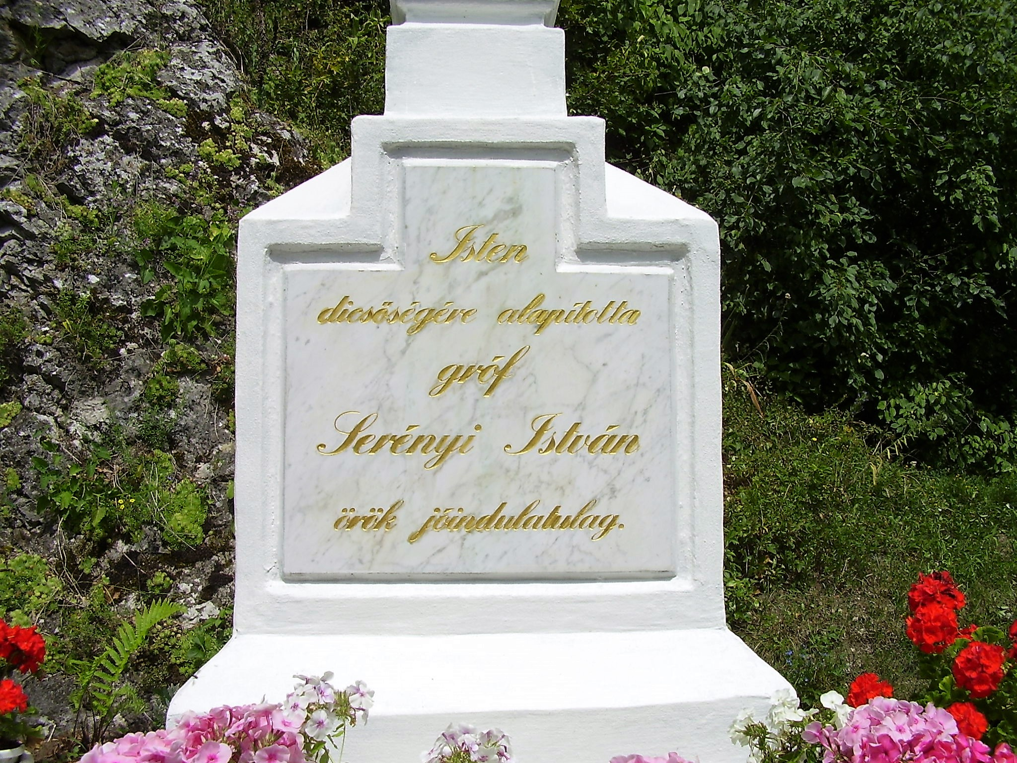 Gróf Serényi István állíttatta a kőkeresztet Dédestapolcsányban 1907. augusztus 20-án. Az 1960-as évek elején a keresztet áthelyezték a templomdobra felvezető gyalogút mellé. 2017-ben a kőkeresztet felújították, környékét rendezték. A felirat szövege: „Isten dicsőségére alapította gróf Serényi István örök jóindulatulag.”